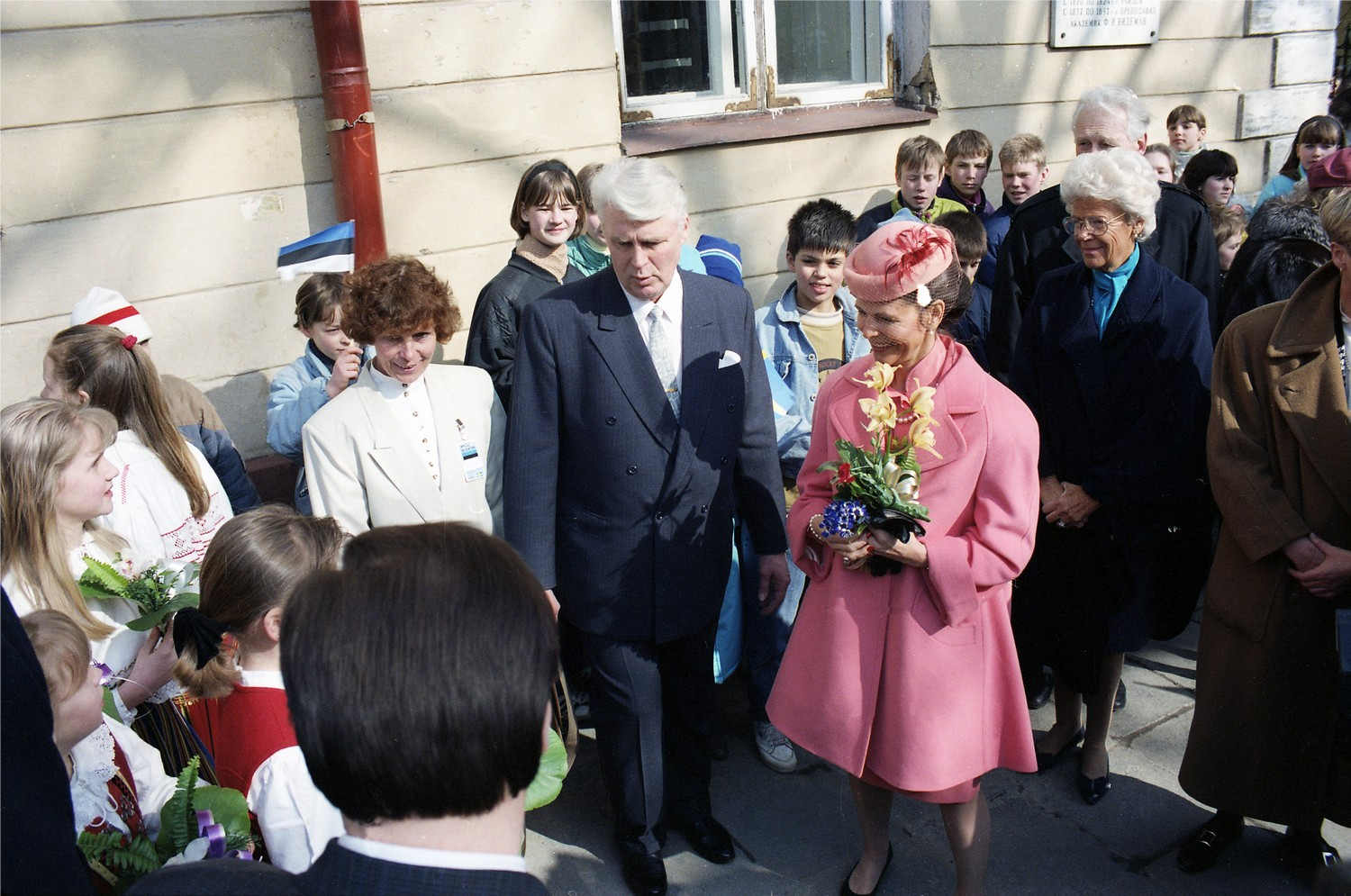 Kuninganna Silvia Gustav Adolfi Gümnaasiumis 92 (02)